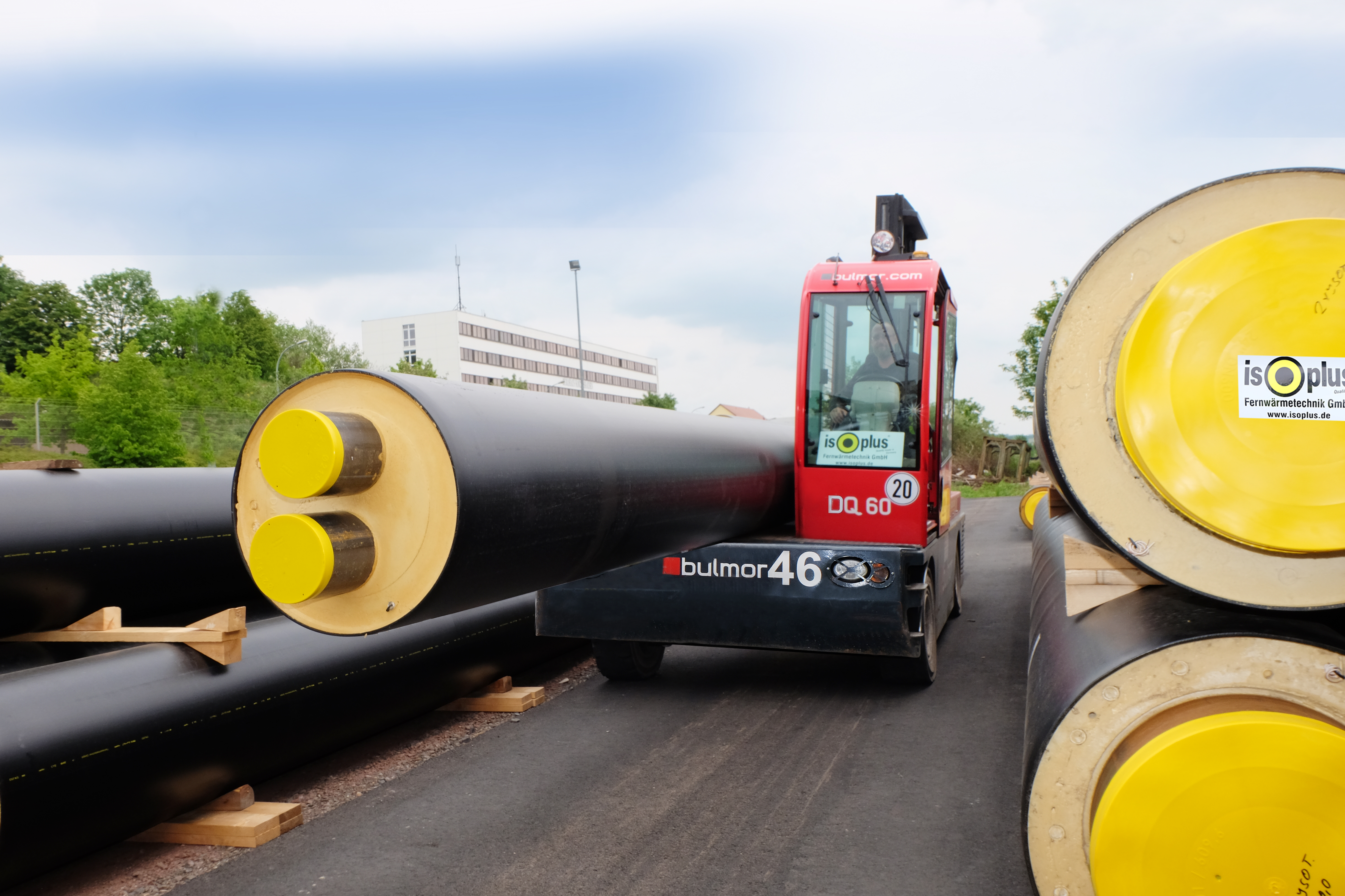 Ein Seitenstapler bei ISO-PLUS im Einsatz